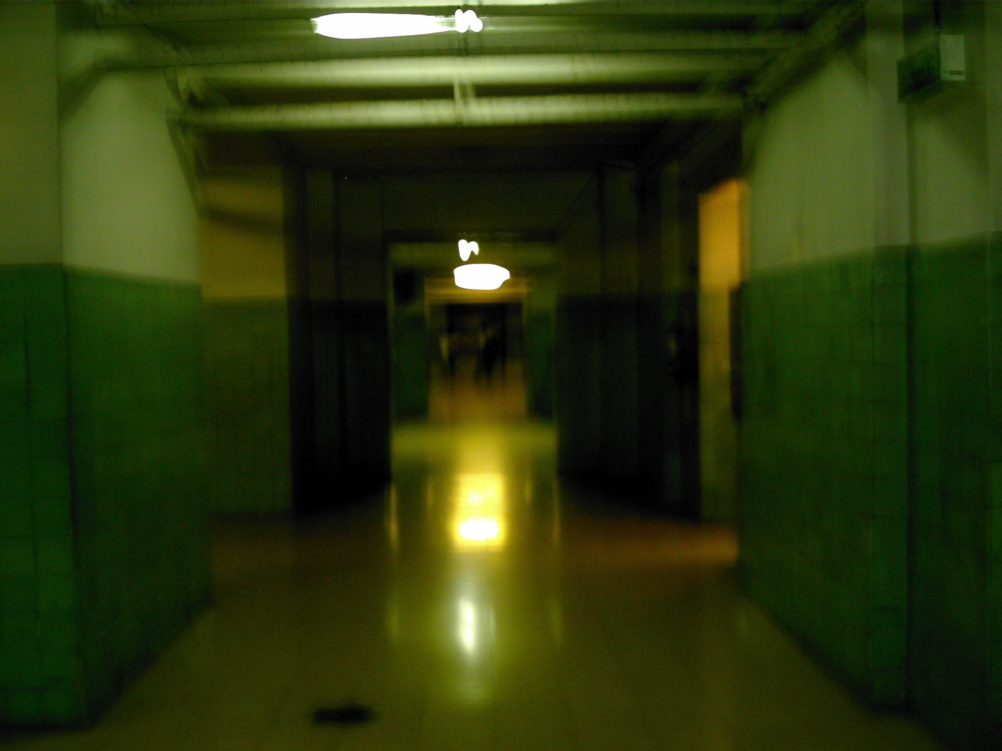 Claustro del subsuelo, donde se encuentran el antiguo gimnasio, algunas aulas, el microcine, la pileta de natación, y el acceso a los antiguos túneles, entre otros.